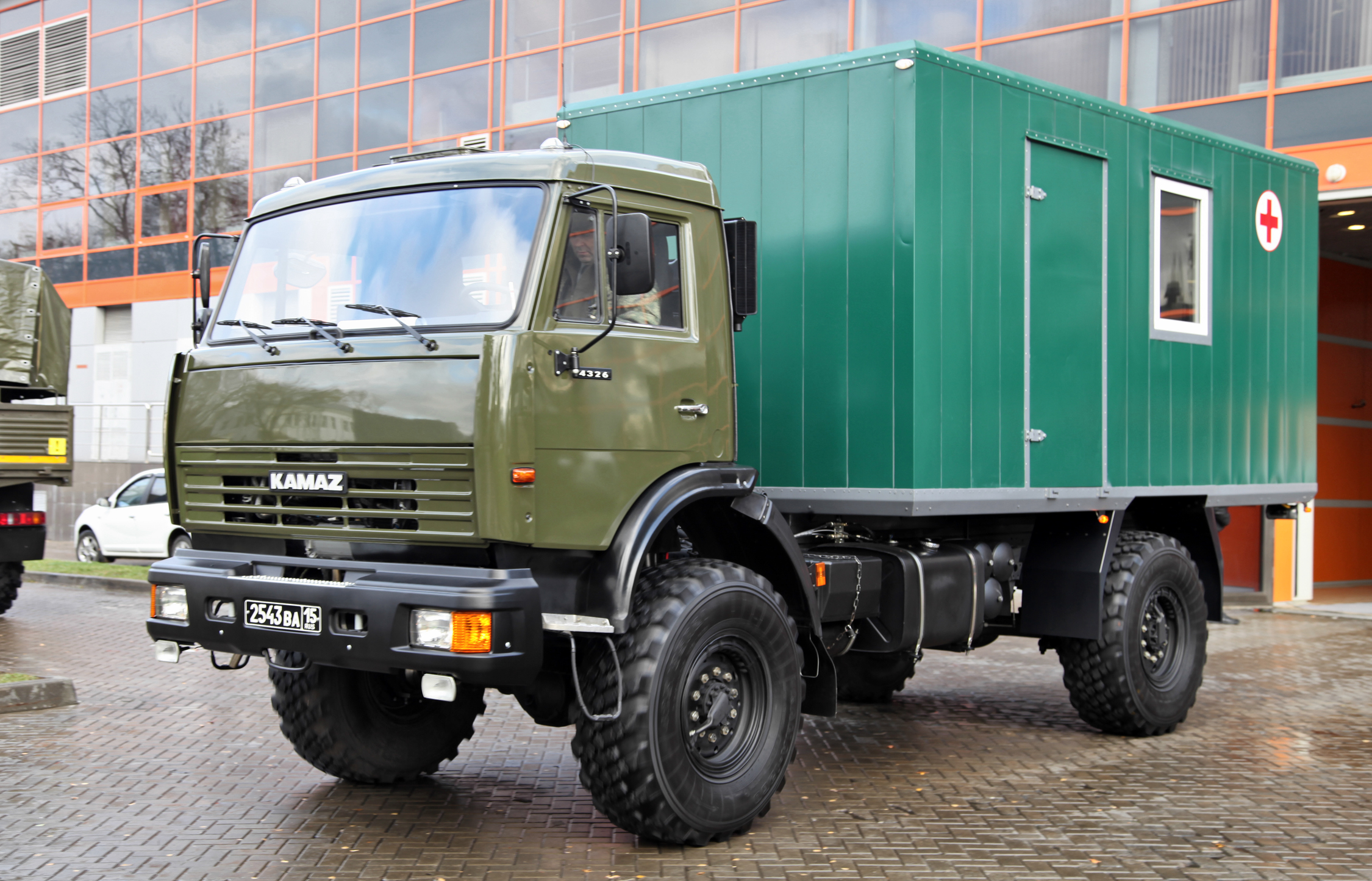 Подвижный флюорографический кабинет на базе КАМАЗ-4326 (Medical mobile fluorography office on KAMAZ-4326 chassis)